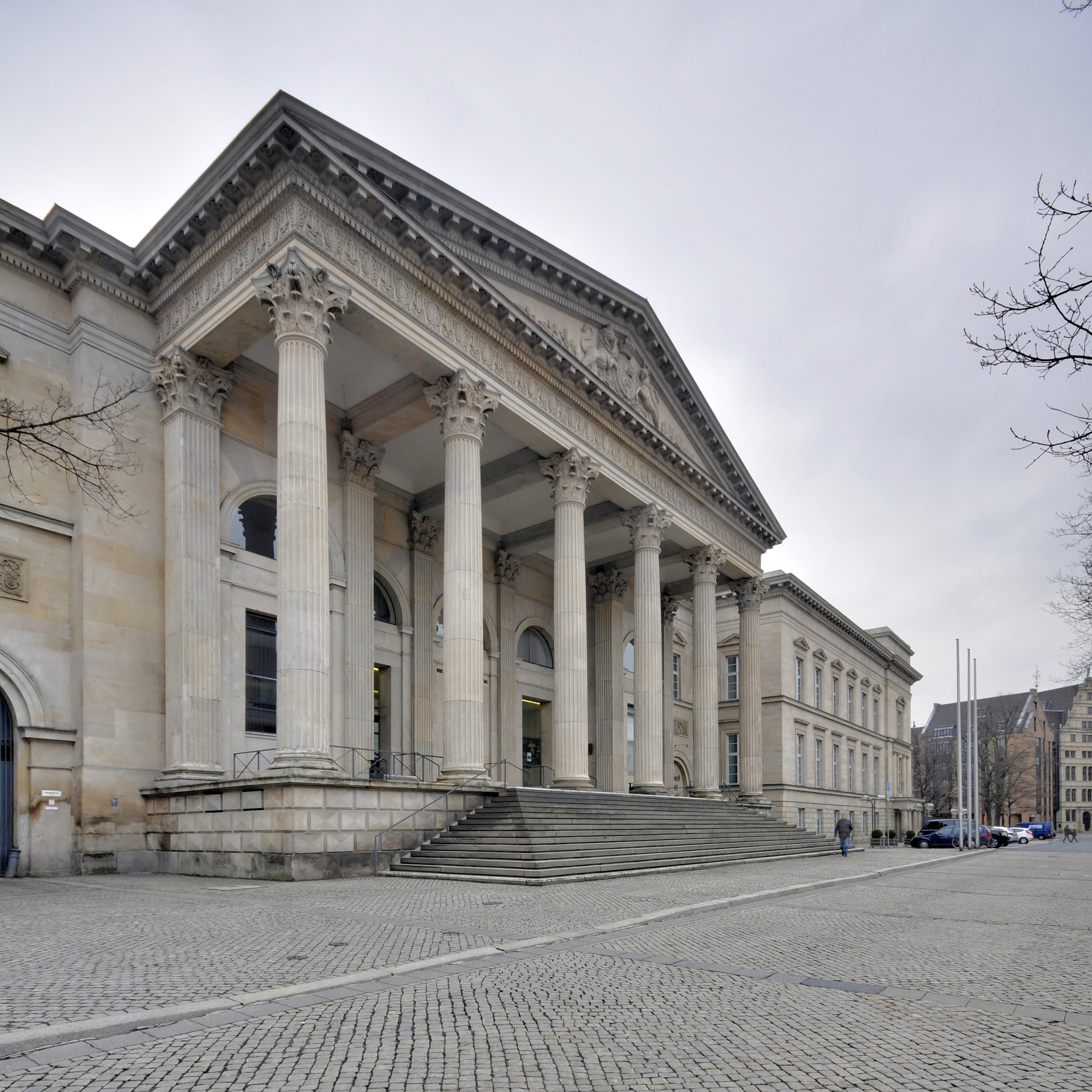 Landtag Niedersachsen, Hannover Wikipedia im Landtag – Niedersachsen 19. März 2013 in HannoverDieses Bild entstand während eines Fototermins im Niedersächsischen Landtagsgebäude in Hannover vor dem geplanten Abriß und Neubau bis 2017. Die Landtagsverwaltung hat uns gestattet, alle Räume zu dokumentieren.